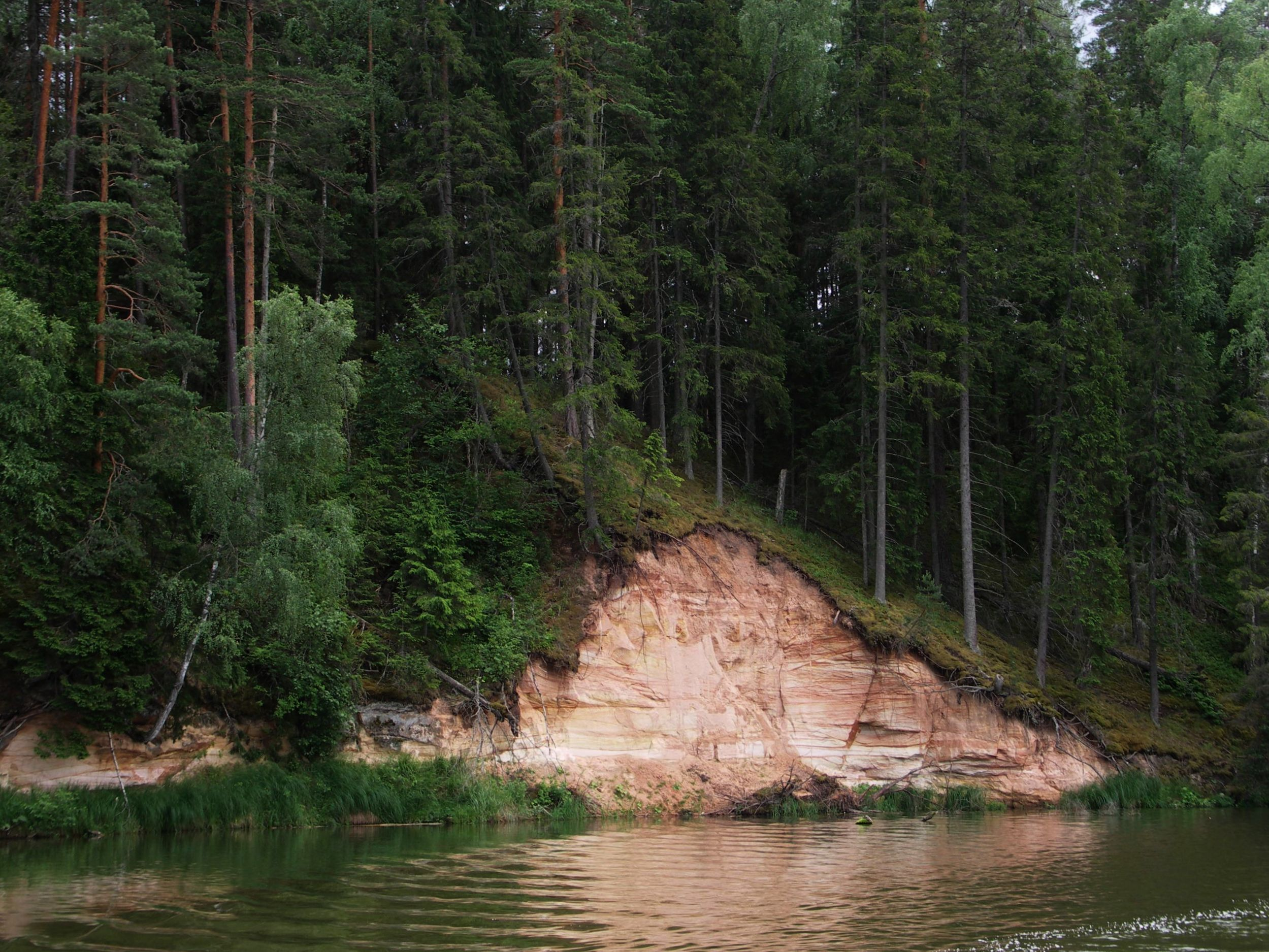 Saesaare paisjärv asub Ahja jõel, Ahja jõe ürgoru maastikukaitsealal.